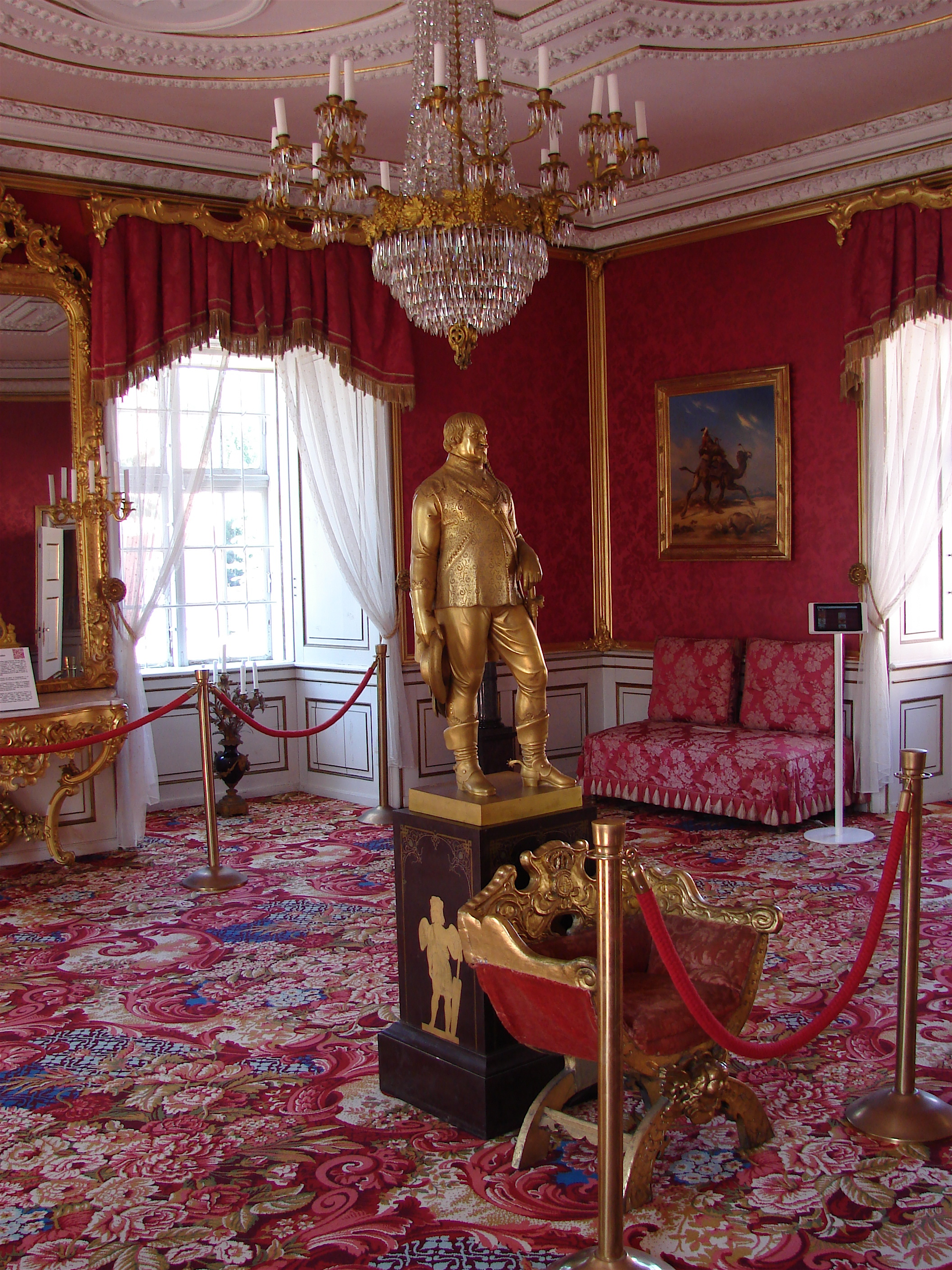 Frederik VIIs audiensrum, Jægerspris Slot, Hornsherred, Danmark